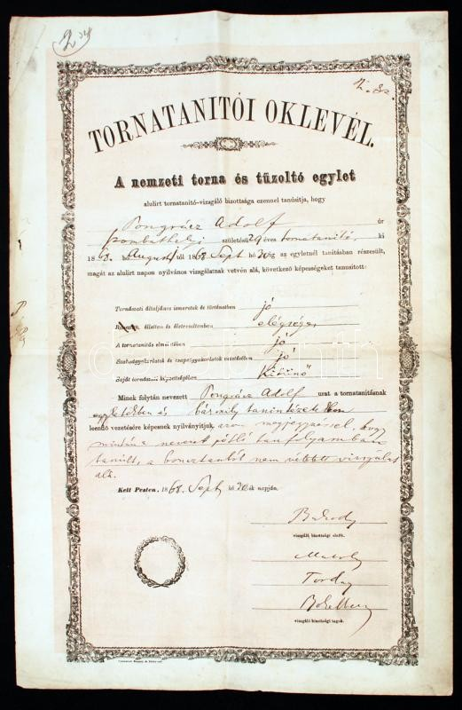 Nemzeti Torna és Tűzoltó Egylet: Tornatanítói oklevél.